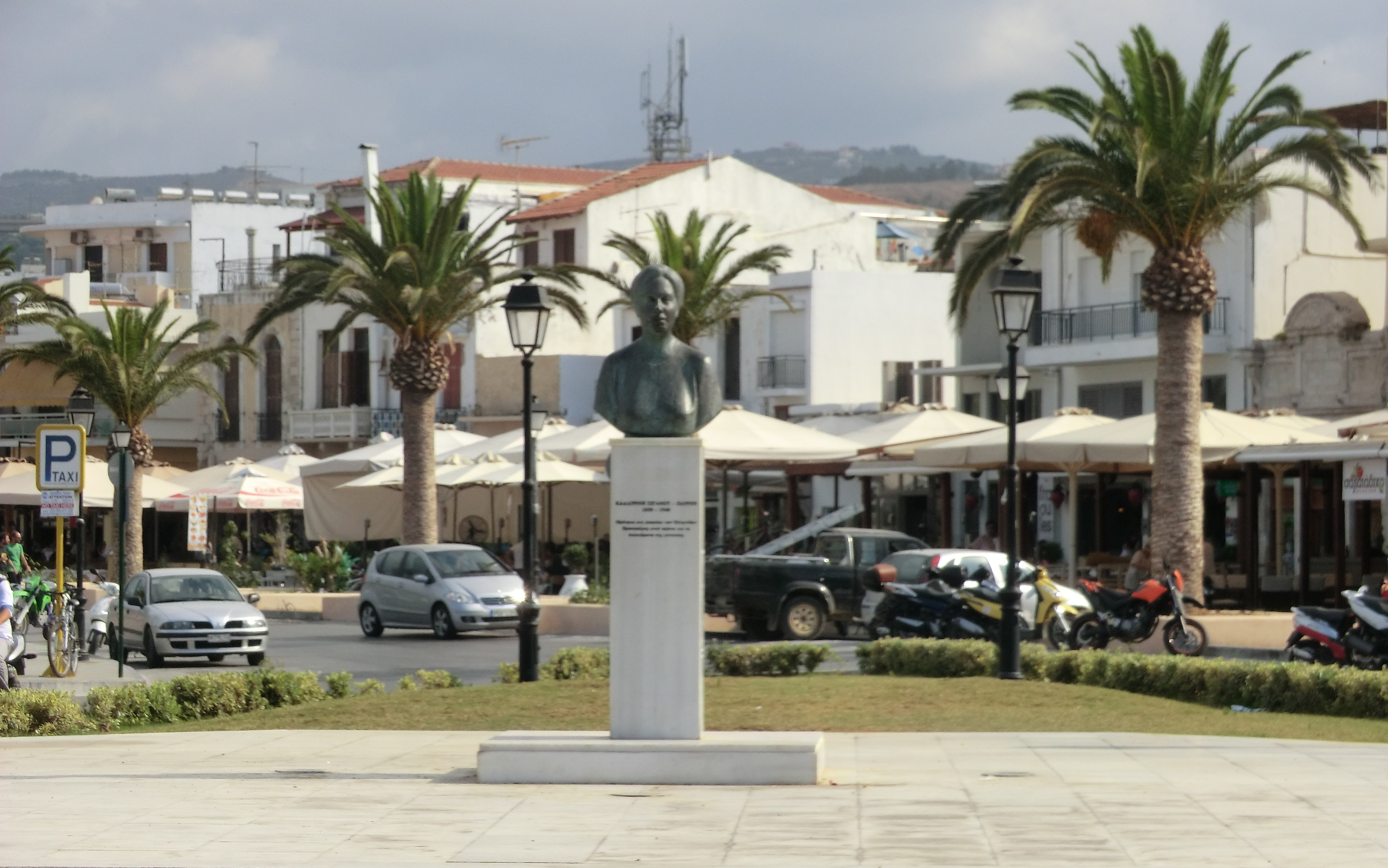 Buste de Kalliroi Parren (Καλλιρρόη Παρρέν) à Réthymnon. La statue indique comme année de naissance 1859, alors que 1861 est généralement retenue.